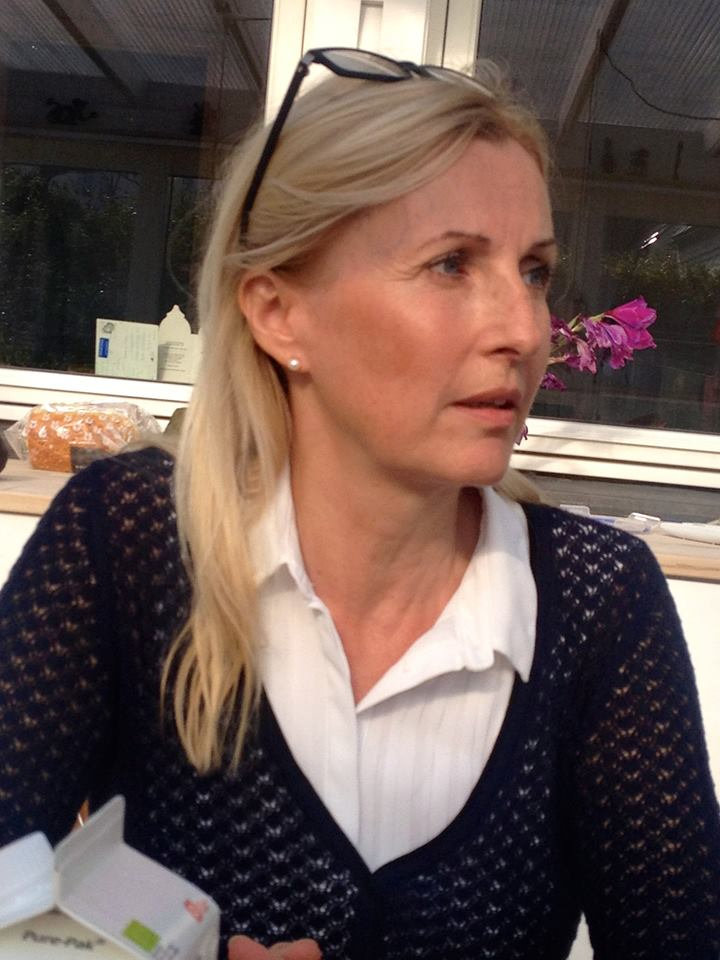 Birgitte Bidgau-Davidsen